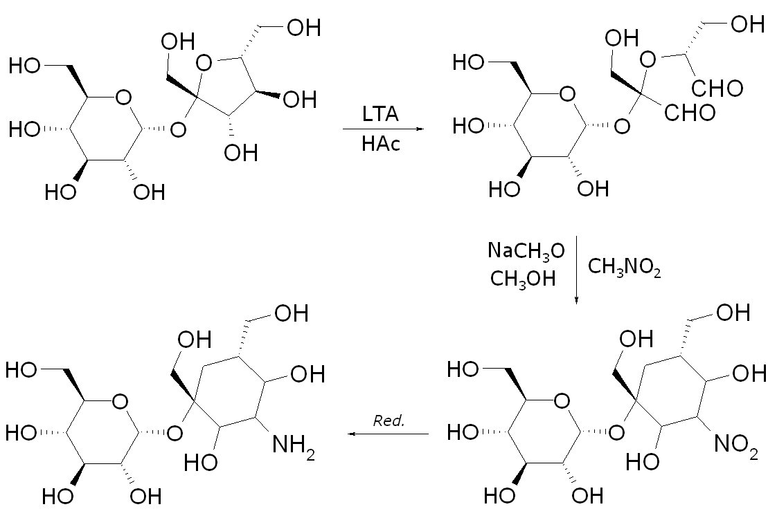 Herstellung von Aminozuckern mit Nitroalkanen am Beispiel der Saccharose (zuerst oxidative Spaltung mit LTA, danach Ringschluss mit Nitromethan.